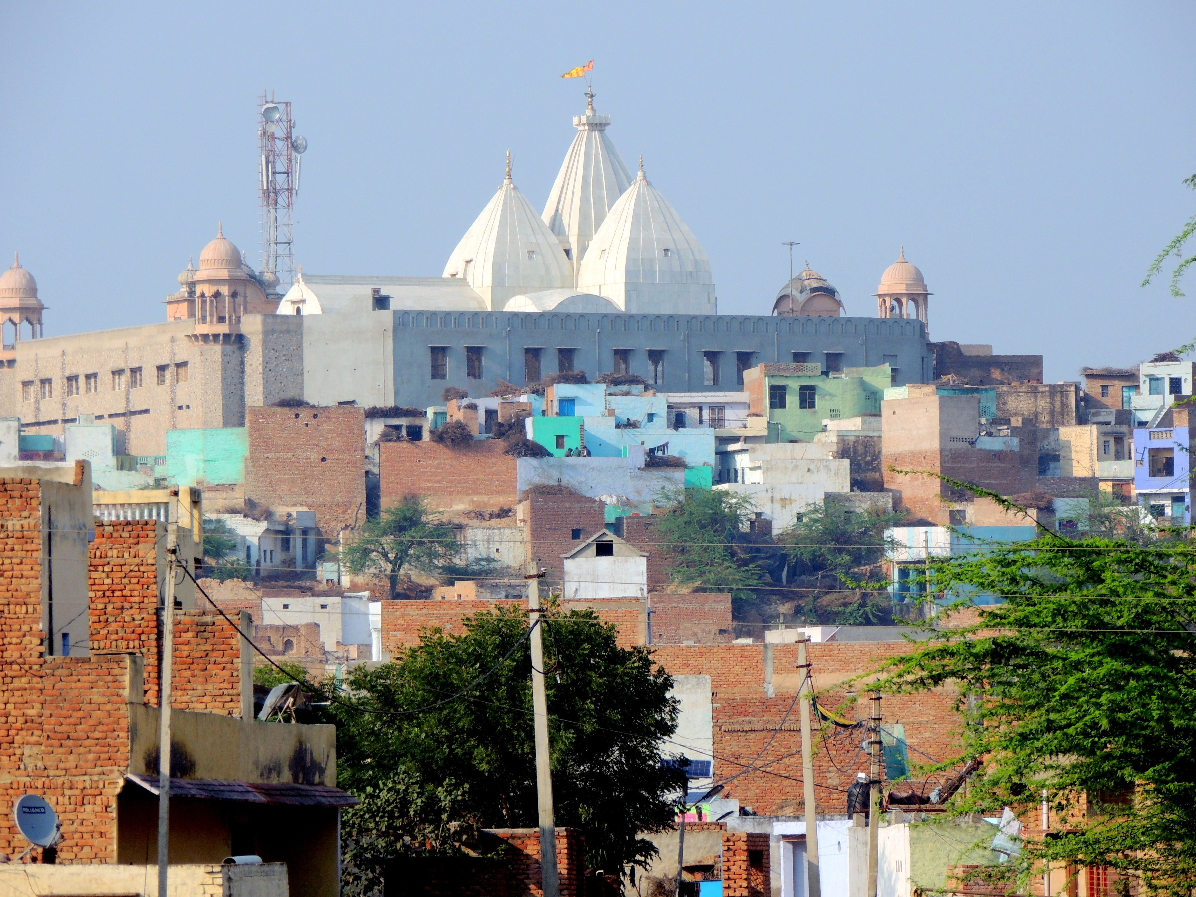 नंदगांव का क़स्बा और पहाडी पर नंदराय मंदिर